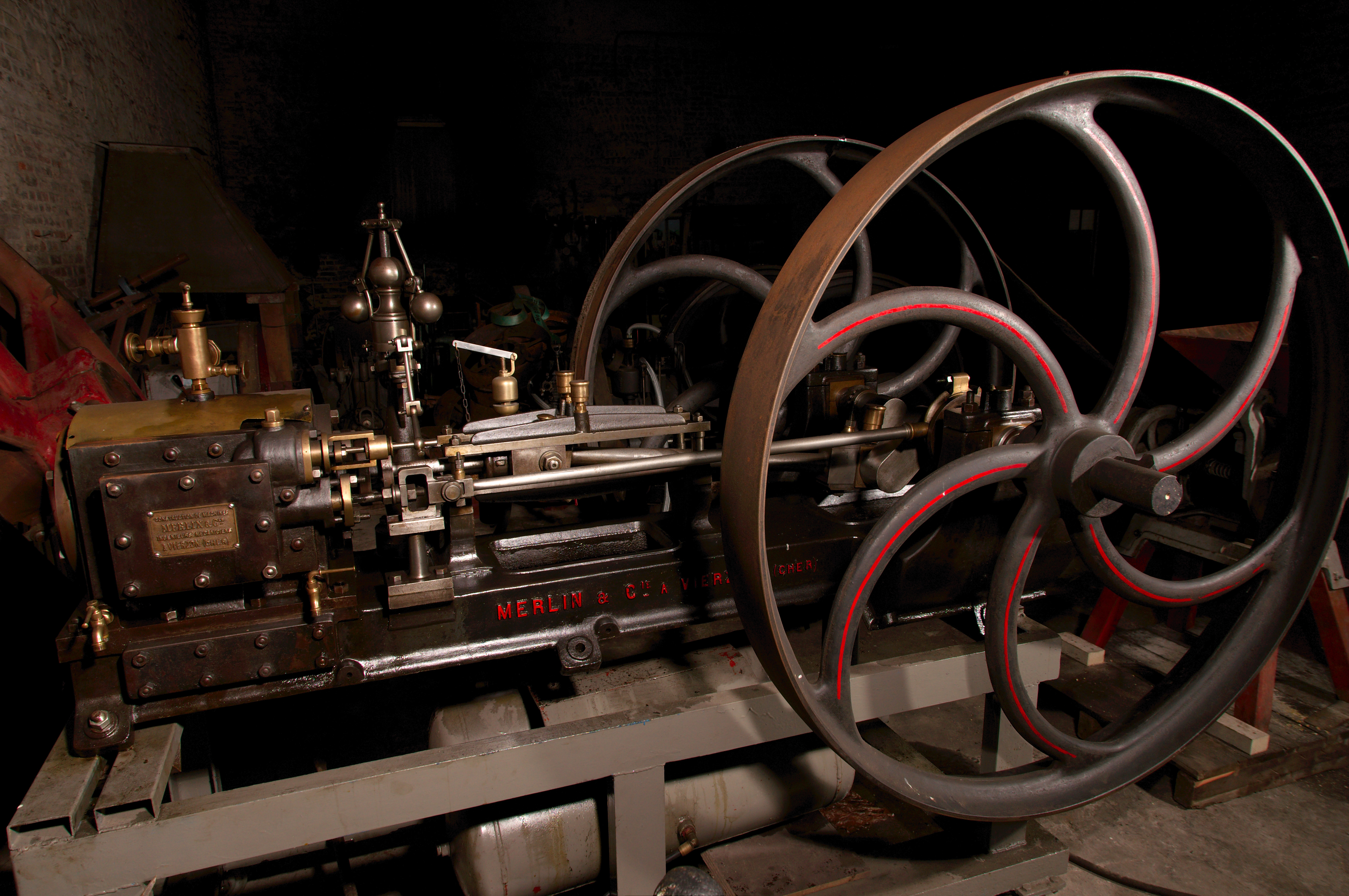 Locomobile Merlin, machine à vapeur agricole du Centre d’Histoire Sociale, Expotec 103